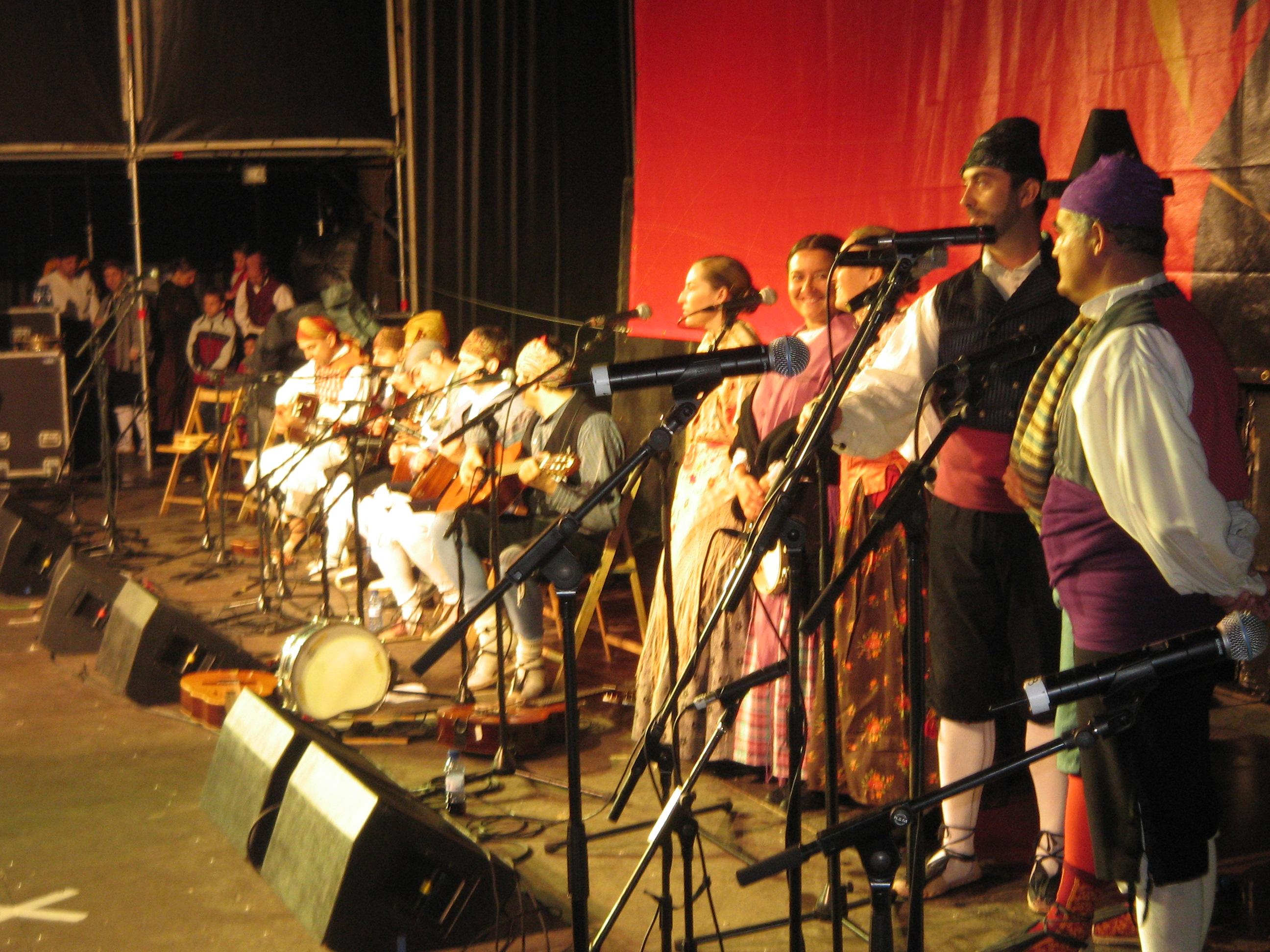 Somerondón (associació universitària de folklore aragonés) en viu a la Plaça del Pilar de Saragossa en 2006